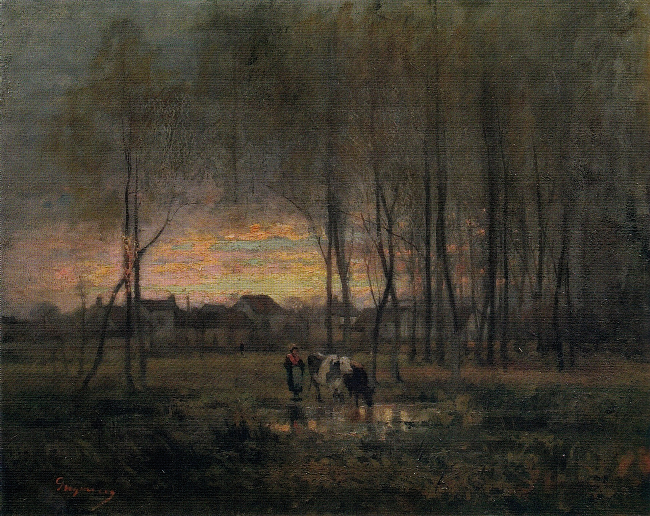 La adăpat, ulei pe pânză - Galeria de Artă Românească Modernă de la Muzeul Național de Artă al României.